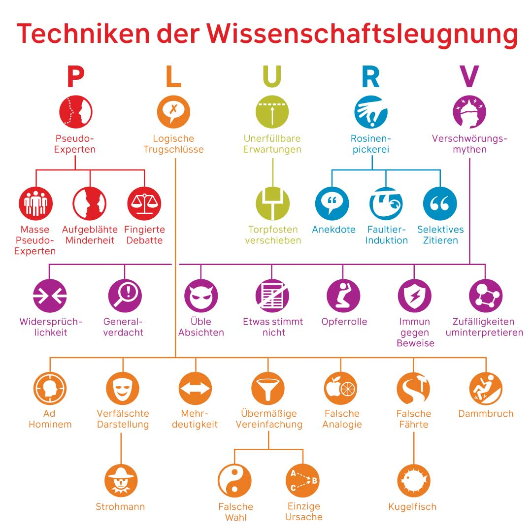 PLURV Taxonomie der Techniken der Wissenschaftsleugnung Es gibt fünf grundsätzliche Techniken, die bei der Wissenschaftsleugnung zum Einsatz kommen. Über die Abkürzung PLURV kann man sie sich merken: Pseudo-Experten Logische Trugschlüsse Unerfüllbare Erwartungen Rosinenpicken Verschwörungsmythen Für jede dieser Techniken gibt es weitere Verfeinerungen, die in der Taxonmie dargestellt werden. Im Artikel Die Geschichte der 5 Techniken der Wissenschaftsleugnung gibt es zusätzliche Hintergundinformationen und eine Übersicht der Definitionen gibt es auf dieser Seite. Zur englischsprachige Originalversion geht es hier.